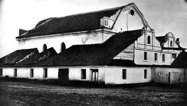 Велика сингагога у Старому Заславі.